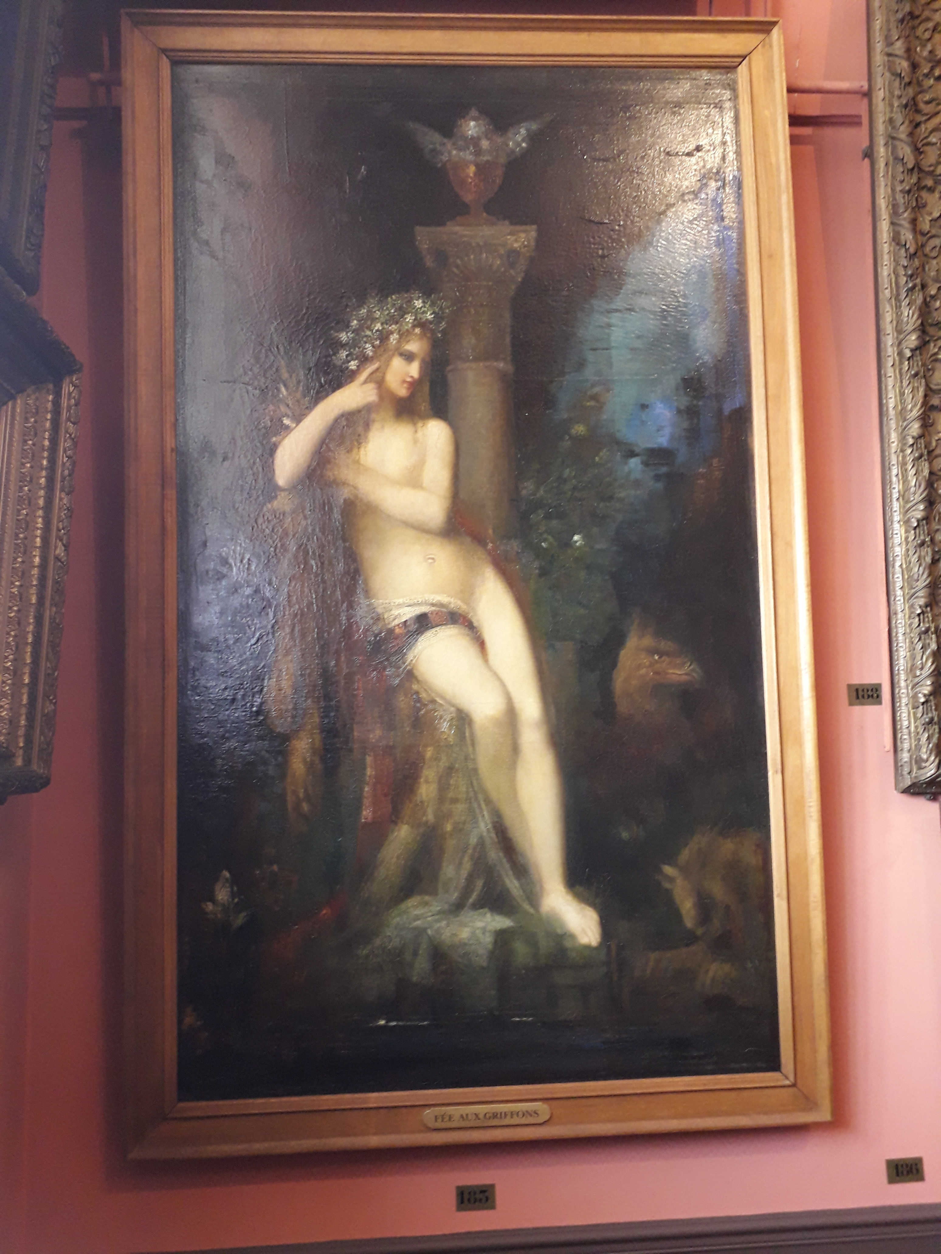 "Fée aux griffons", huile sur toile de Gustave Moreau. Musée Gustave-Moreau, Paris, France. (Moreau a également peint une grisaille portant le même titre, avec une composition et des couleurs différentes.)